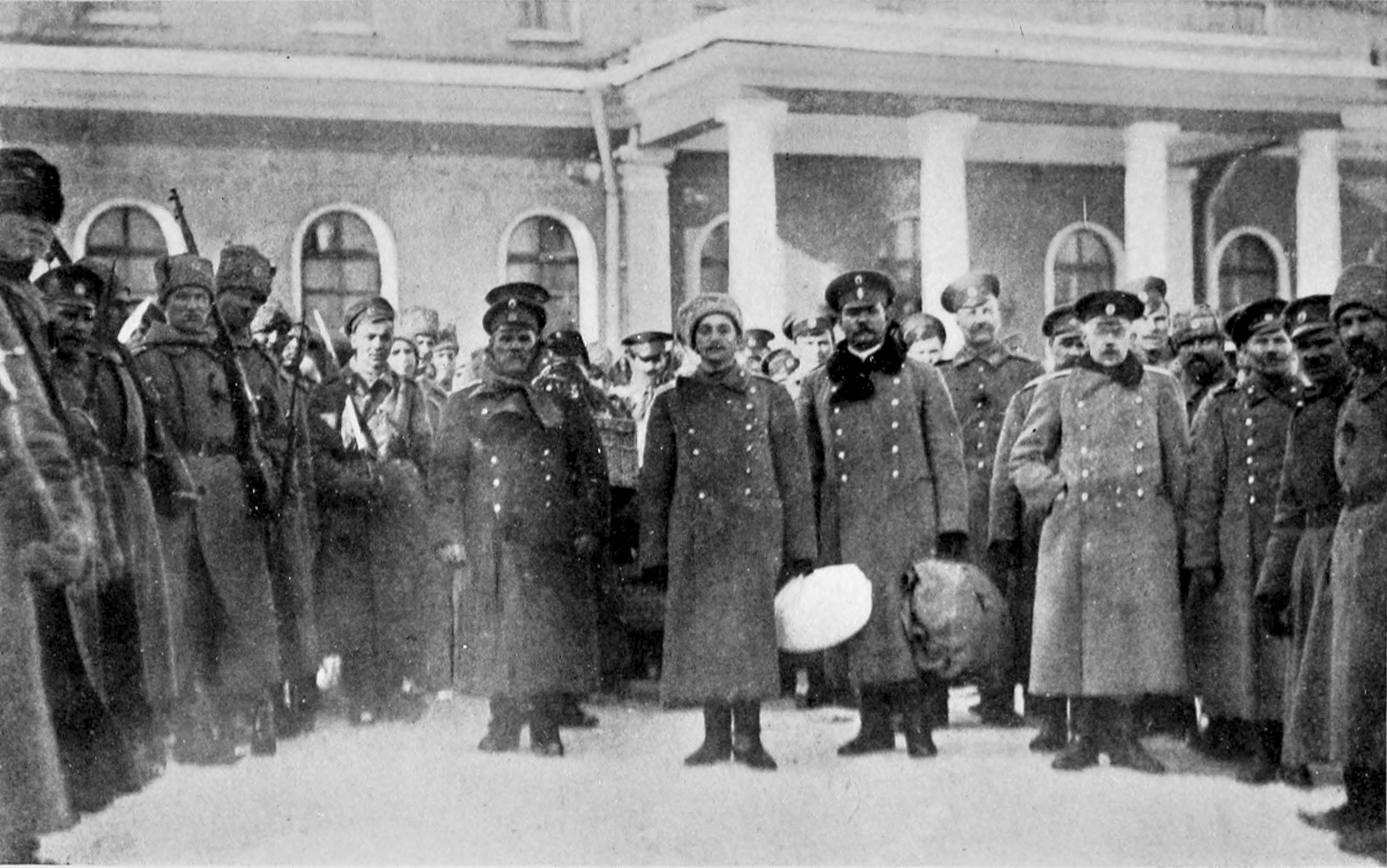 Oficiales arrestados por tropas revolucionarias, marzo de 1917 en Petrogrado.